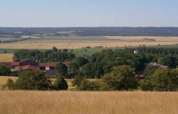 Gersdorfer Burg Blick von den Sewekenbergen